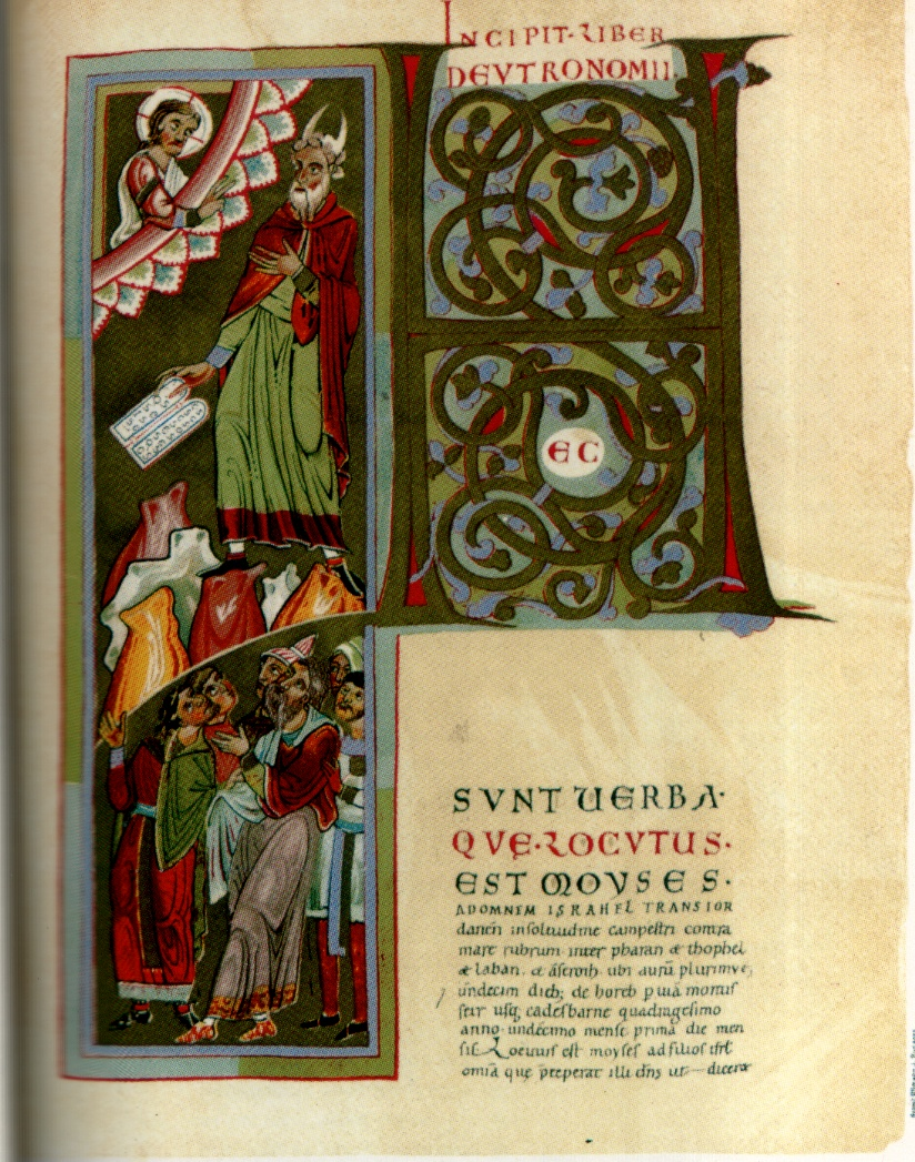 Gutkeled-bibla egy lapja